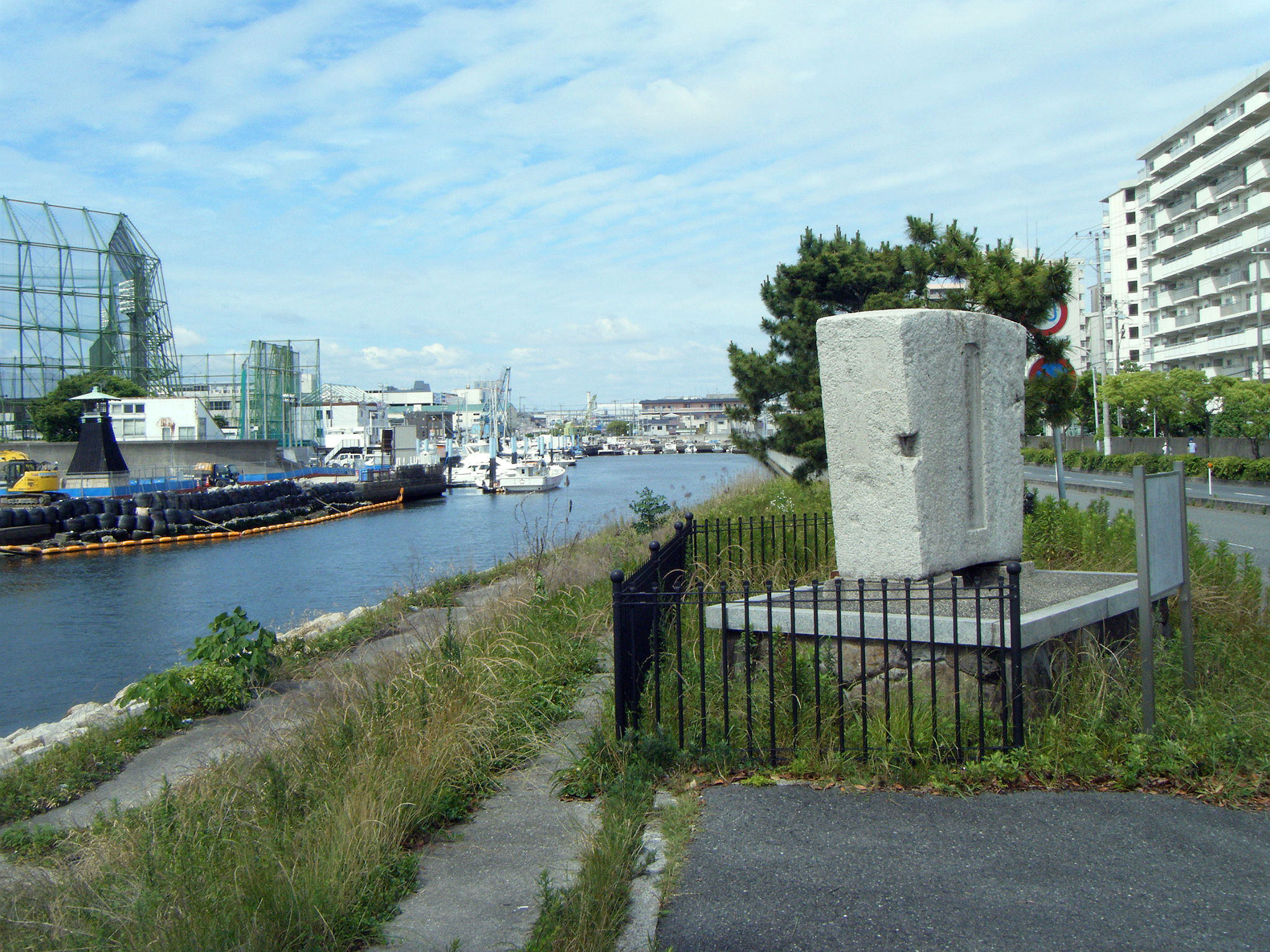 今津砲台跡（今津海岸砲台記念石） 遠景 左は大関酒造今津灯台 兵庫県西宮市